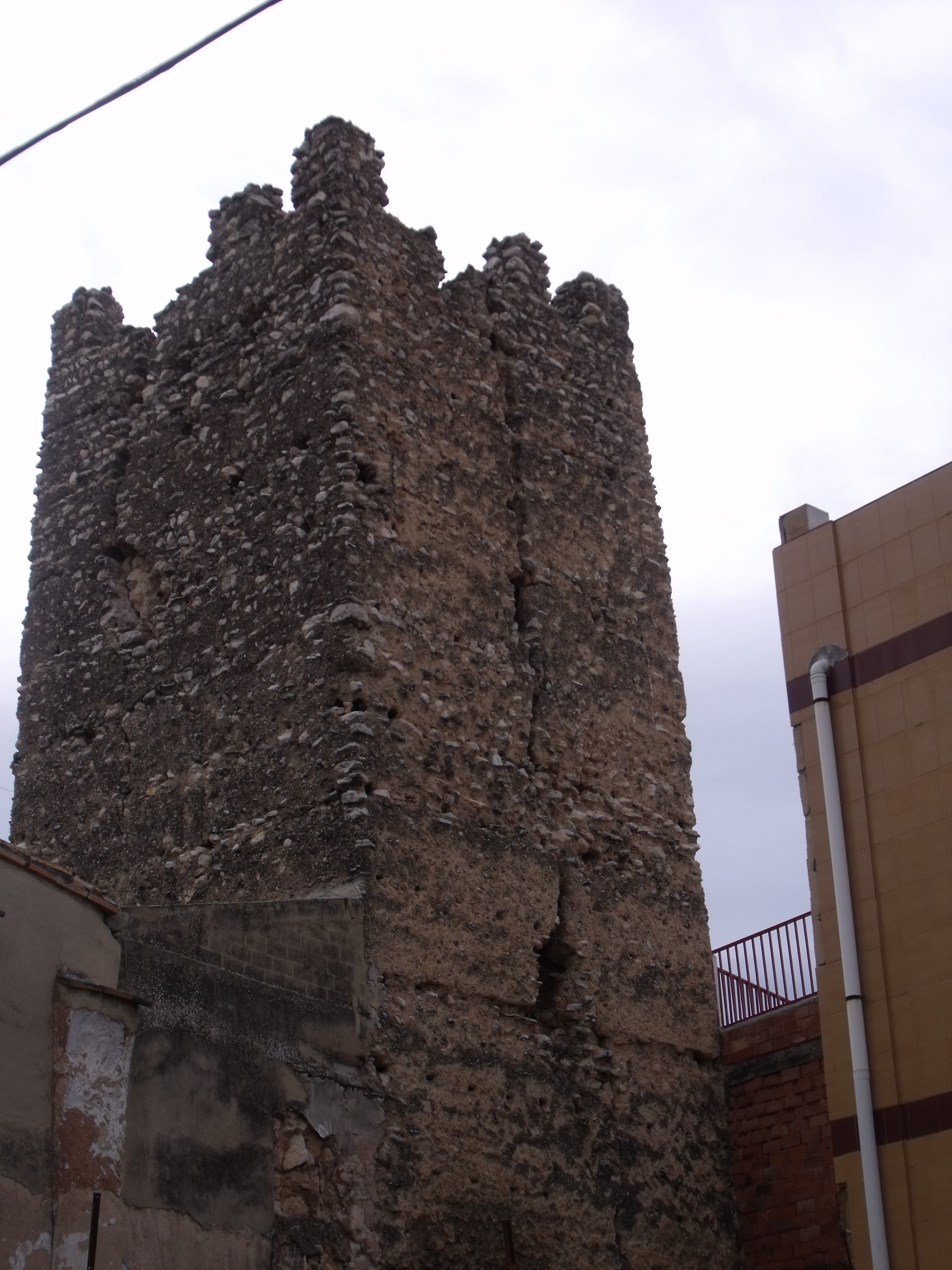 Torre árabe de Godelleta.